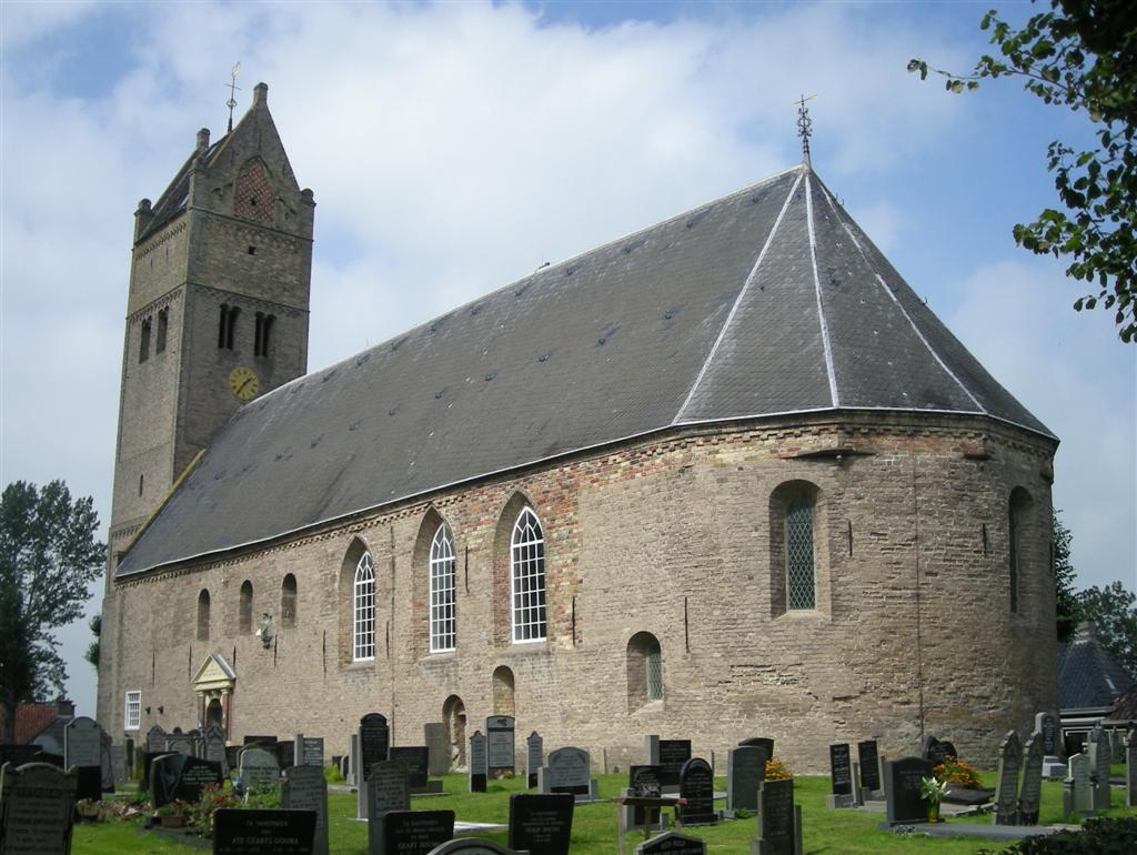 Kerk Jorwerd (church)